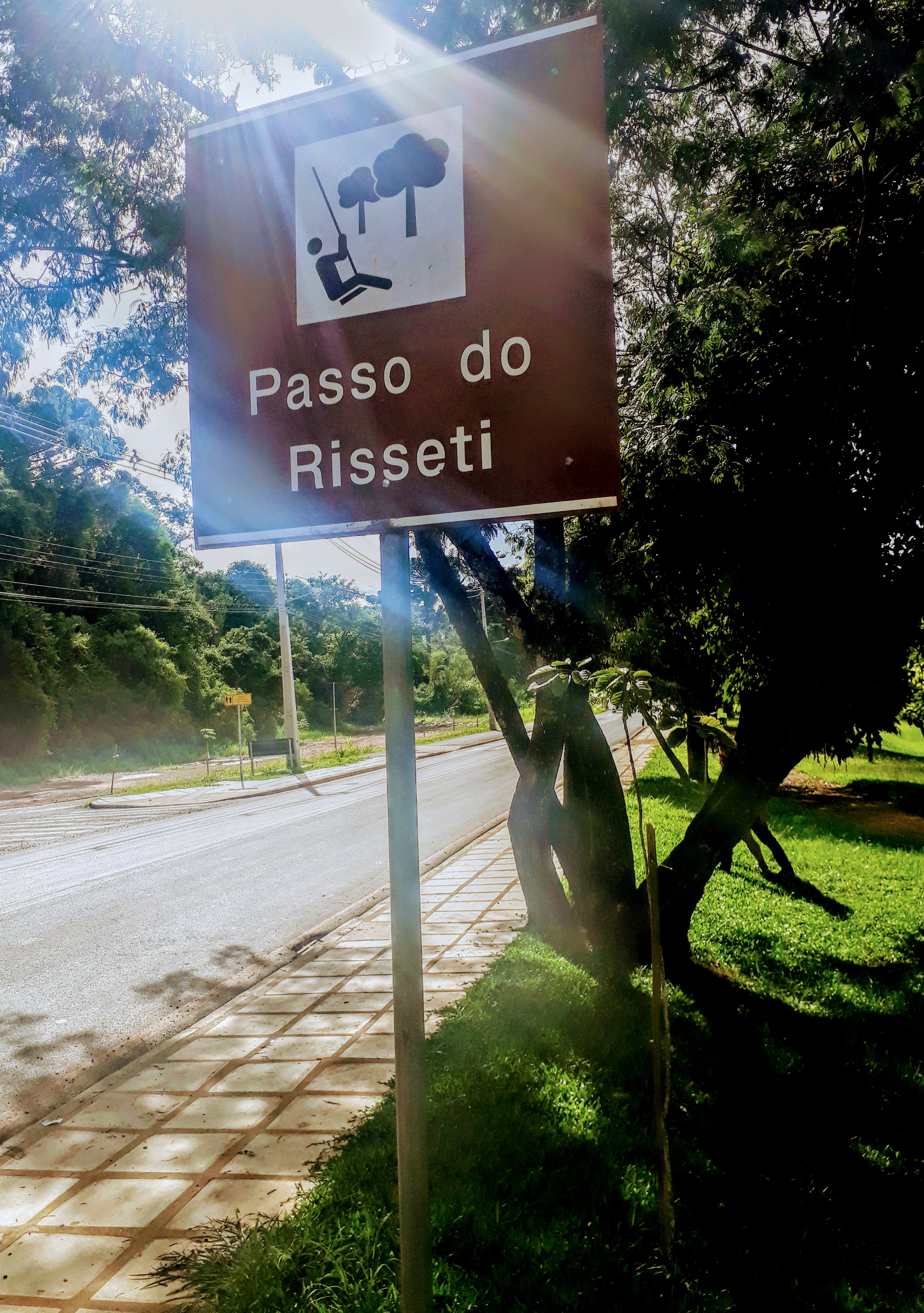 Parque Passo do Risseti, em Tibagi, no Paraná.